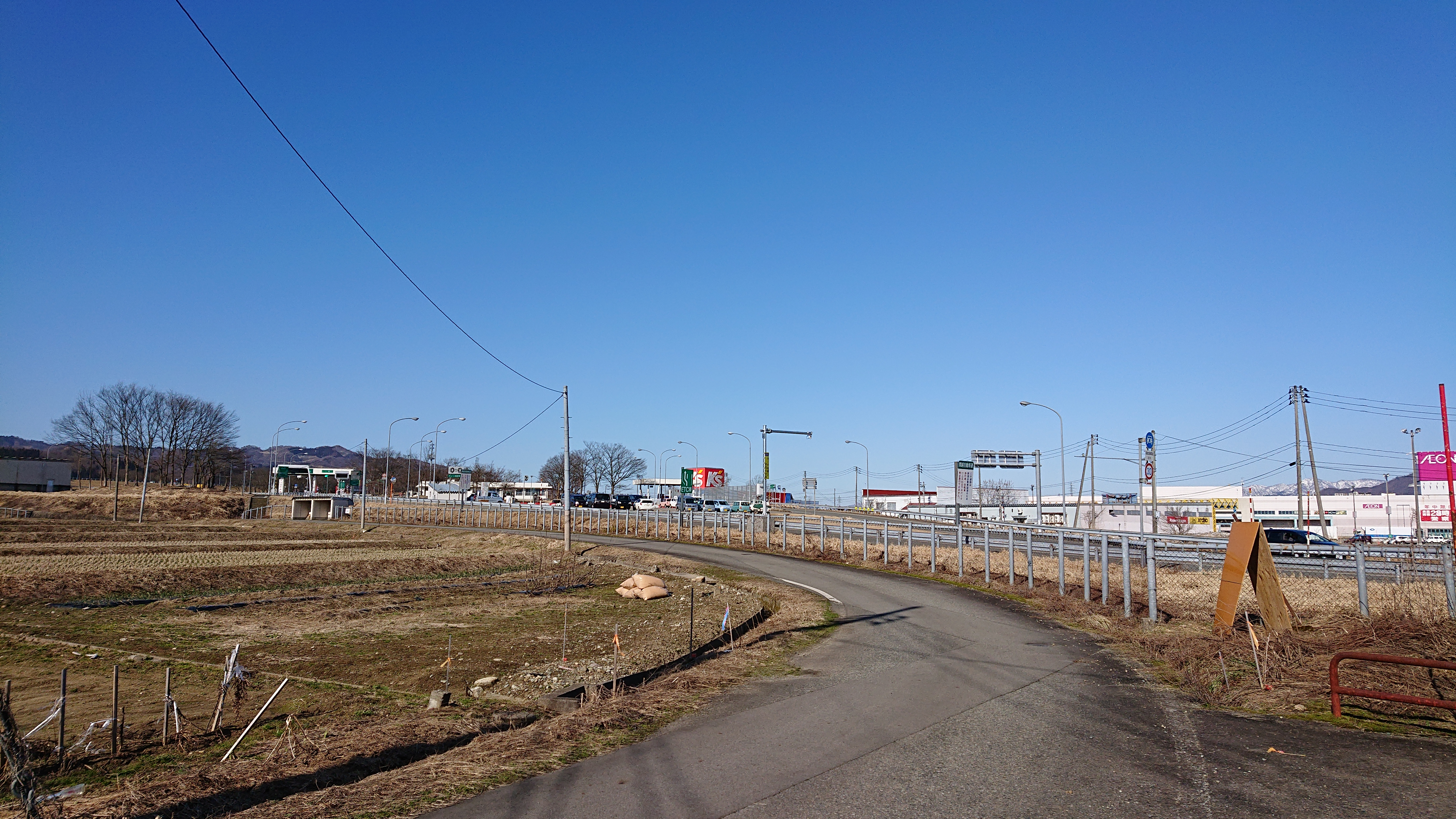 六日町インターチェンジを入口側から撮影。